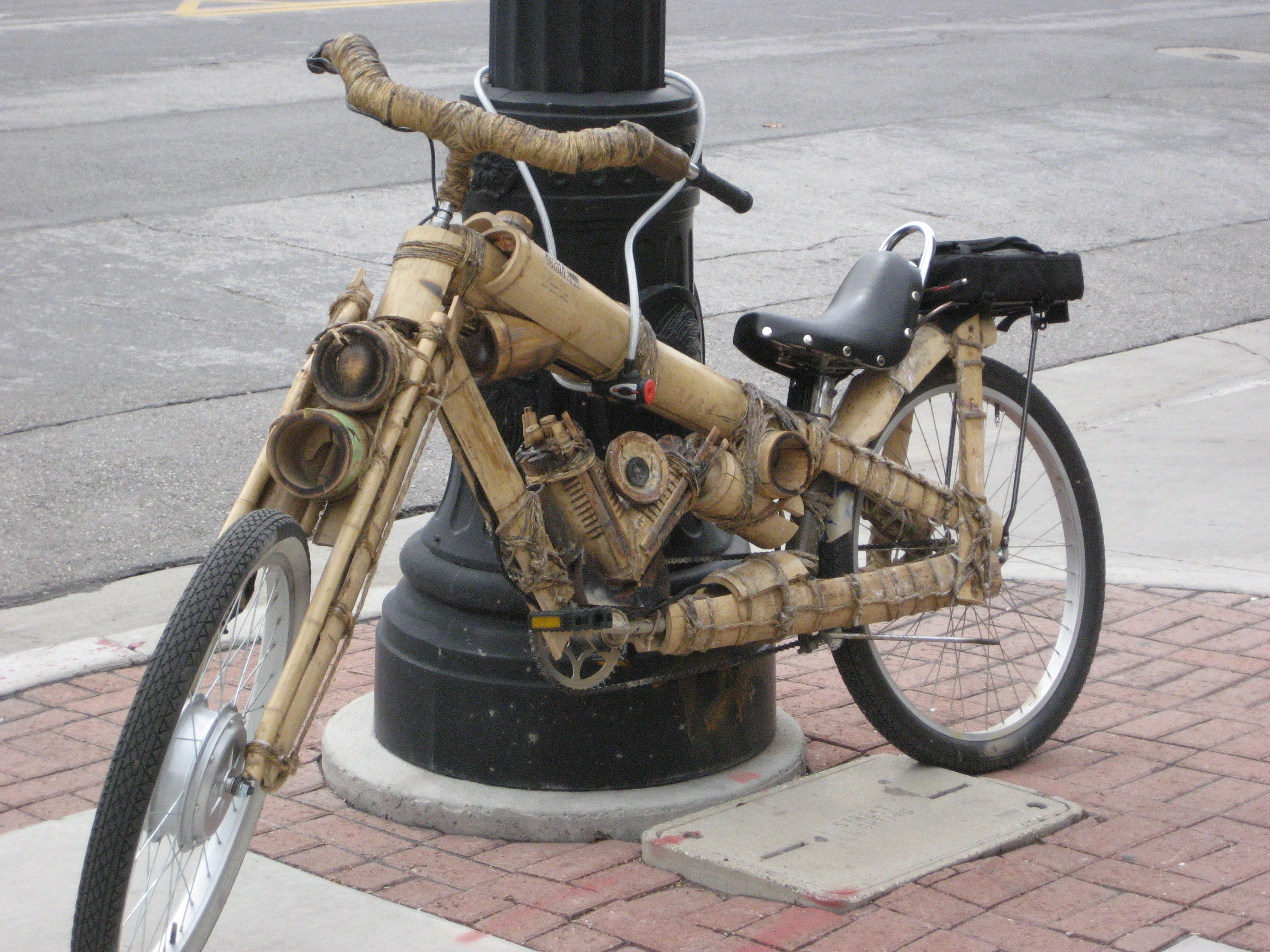 Bamboo bike.